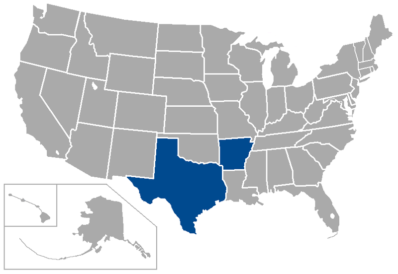 Etats où sont implantées les équipes de la SWC